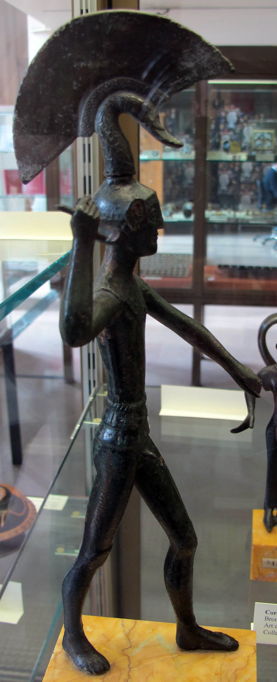 Arte etrusca, guerriero, da todi, 500-450 ac. ca